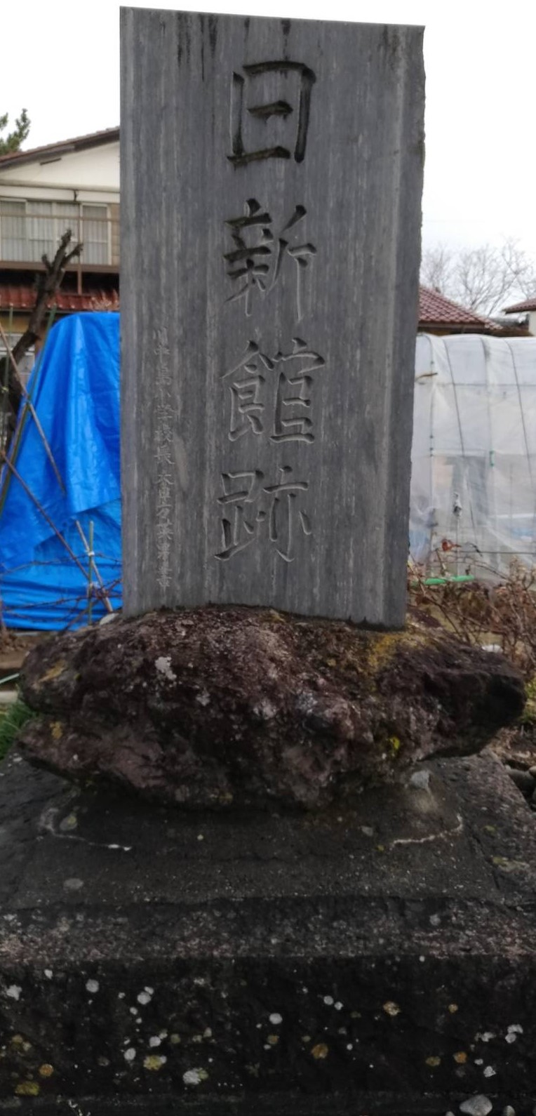 日新館の跡地の記念碑。 記念碑の場所で2020年1月29日撮影